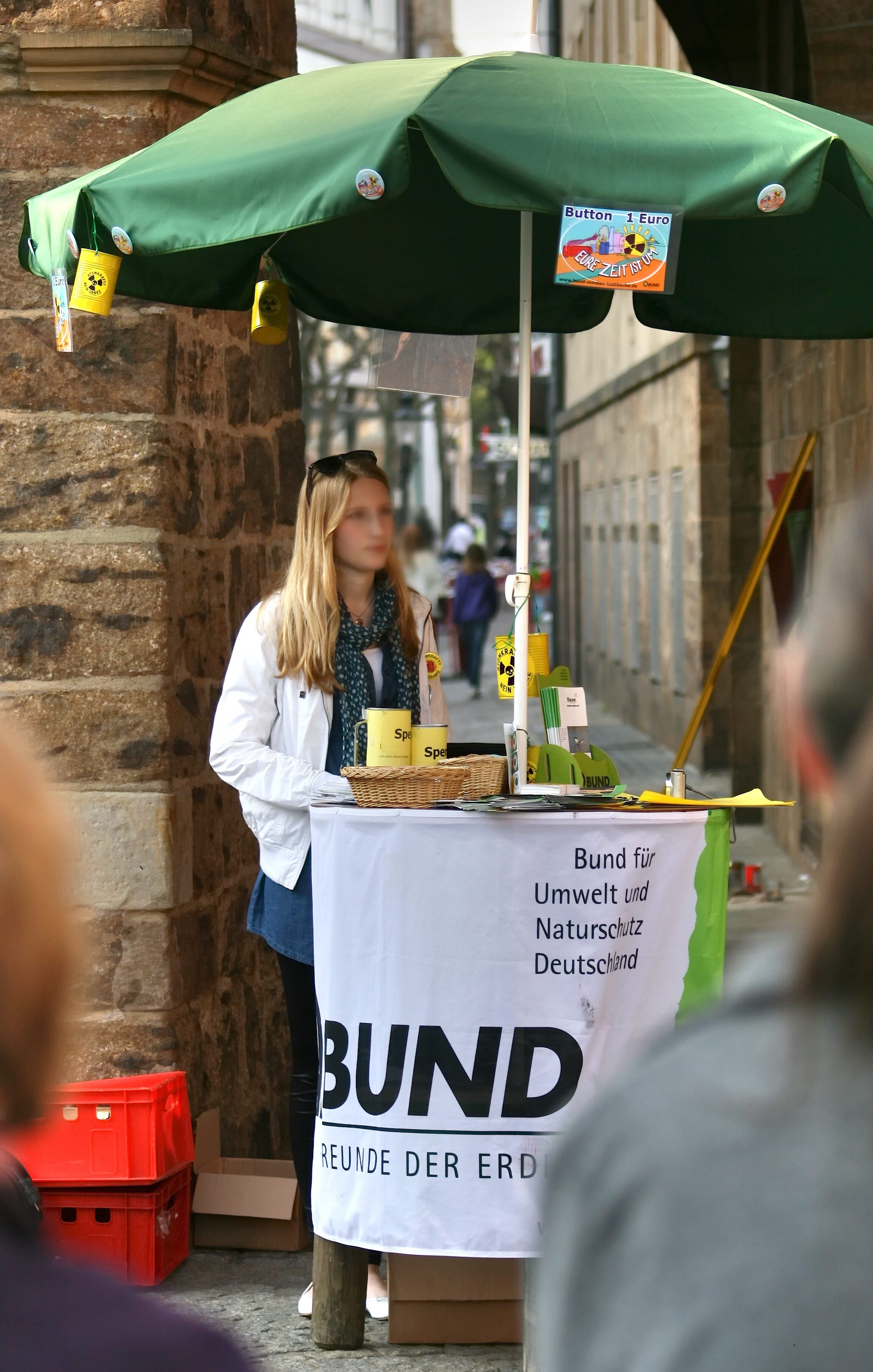 Informationsstand des Bundes für Umwelt und Naturschutz Deutschland (BUND) im Rahmen einer Anti-Atomkraft-Mahnwache in Minden in Nordrhein-Westfalen, Deutschland.